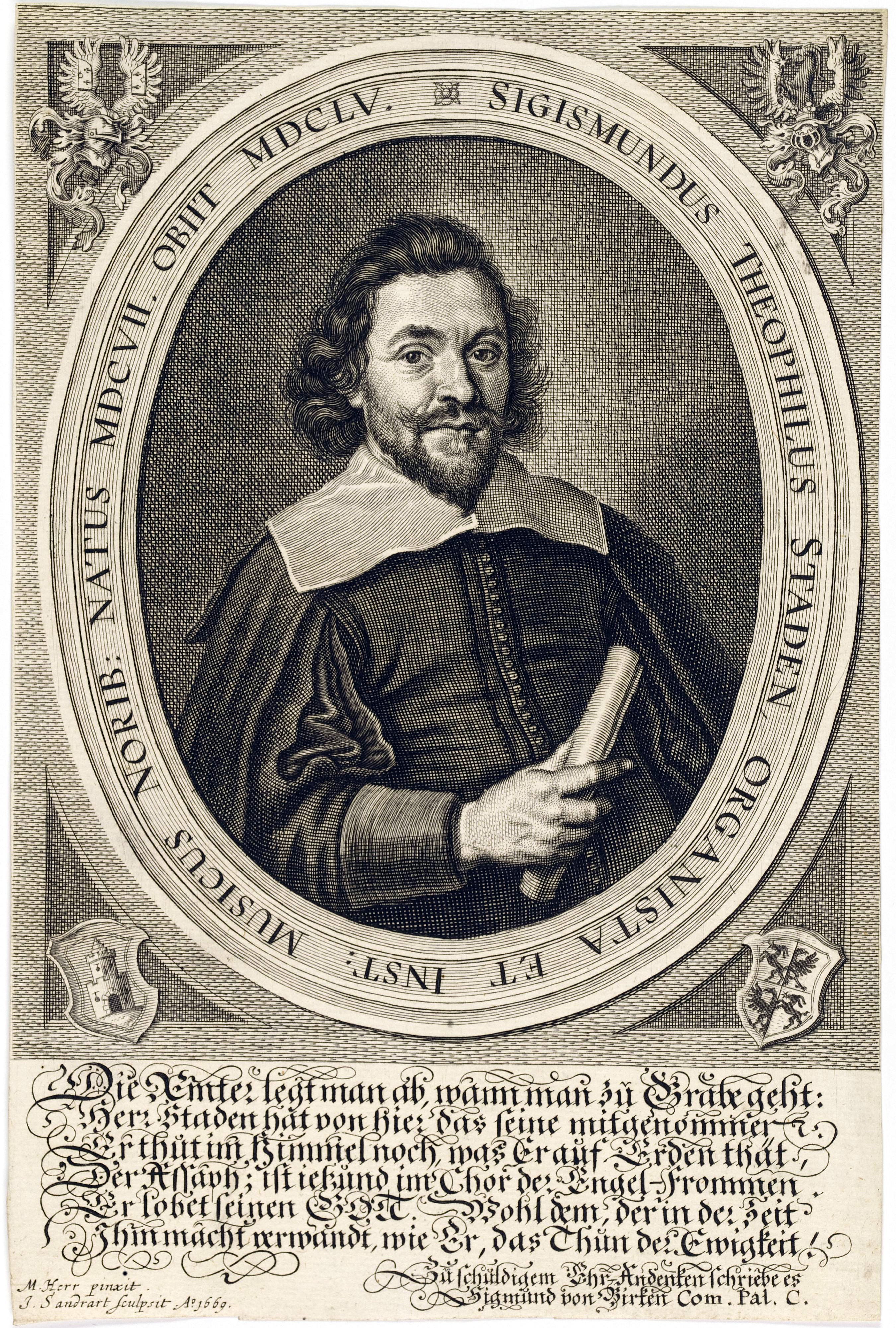 Grafik aus dem Klebeband Nr. 3 der Fürstlich Waldeckschen Hofbibliothek Arolsen Motiv: Sigmund Theophil Gottlieb Staden (1607–1655), Organist, Komponist, Stadtpfeifer, Maler und Dichter